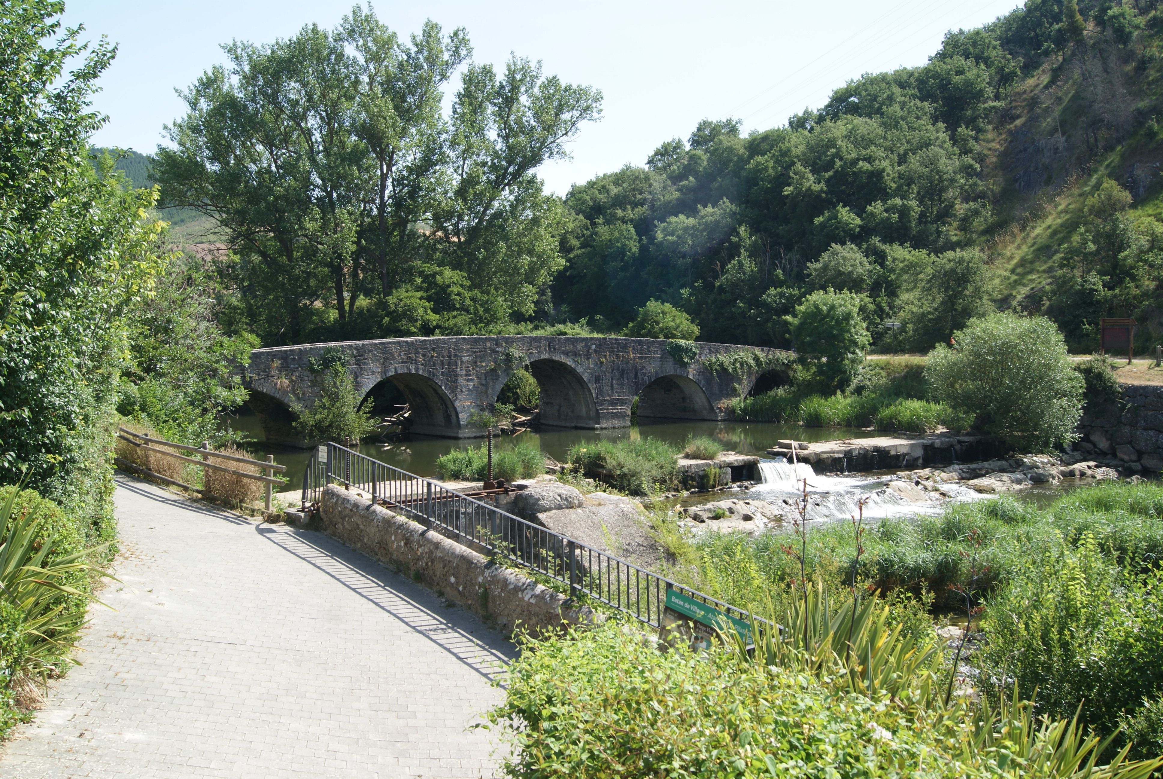 Puente de la Trinidad de Arre (visto desde el Batán de Villava)